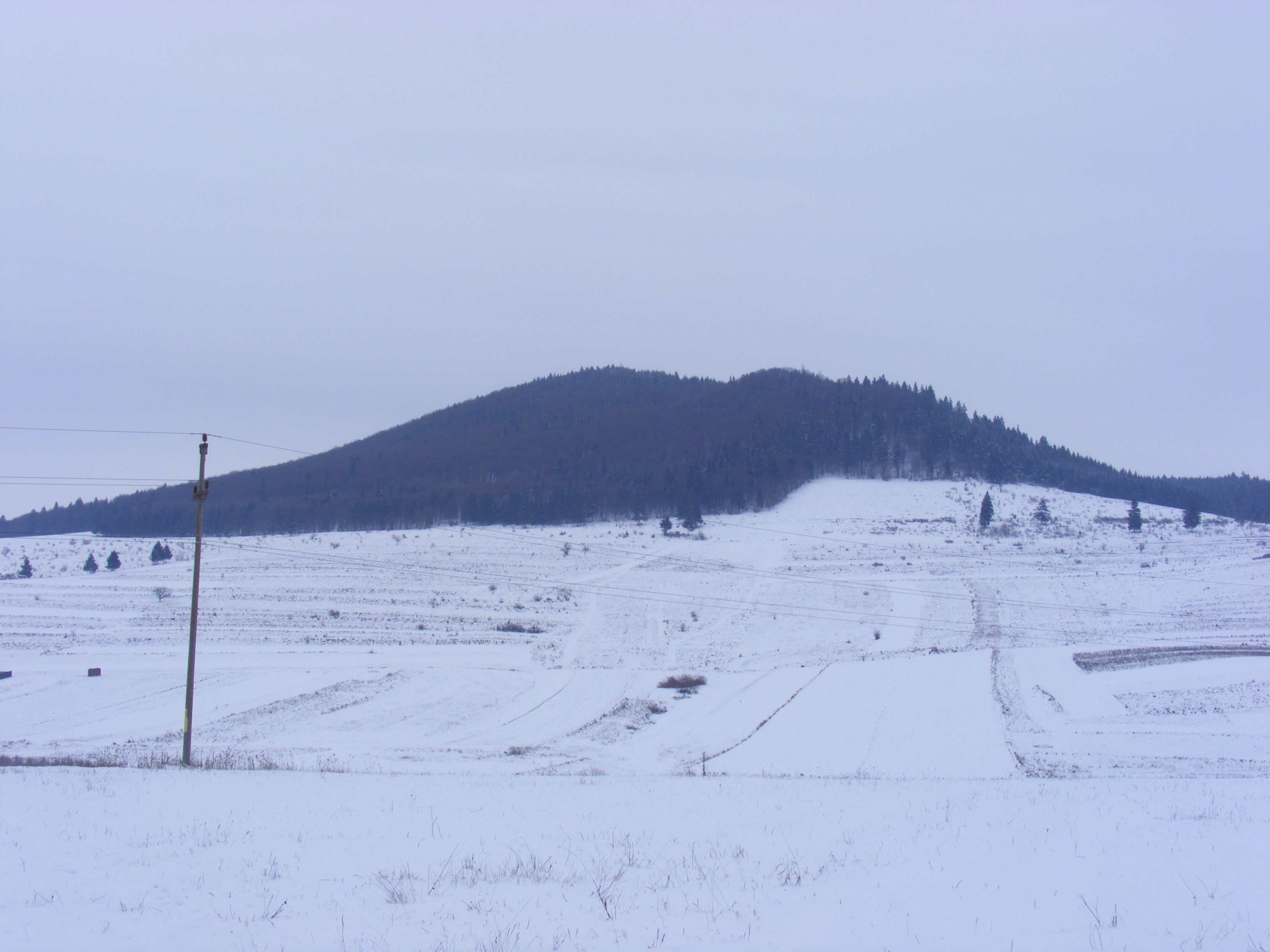 The Nagysomlyó mountaine (Székelyland, near Csíkszereda)